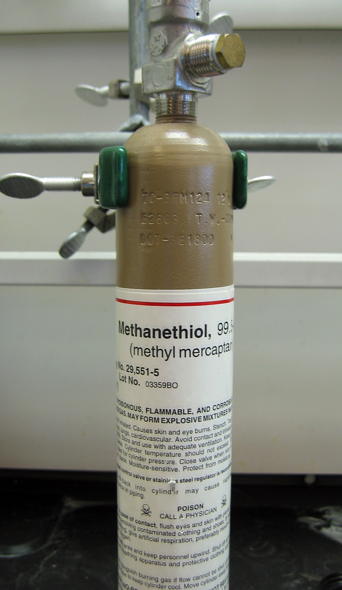 small cylinder of methanethiol gas